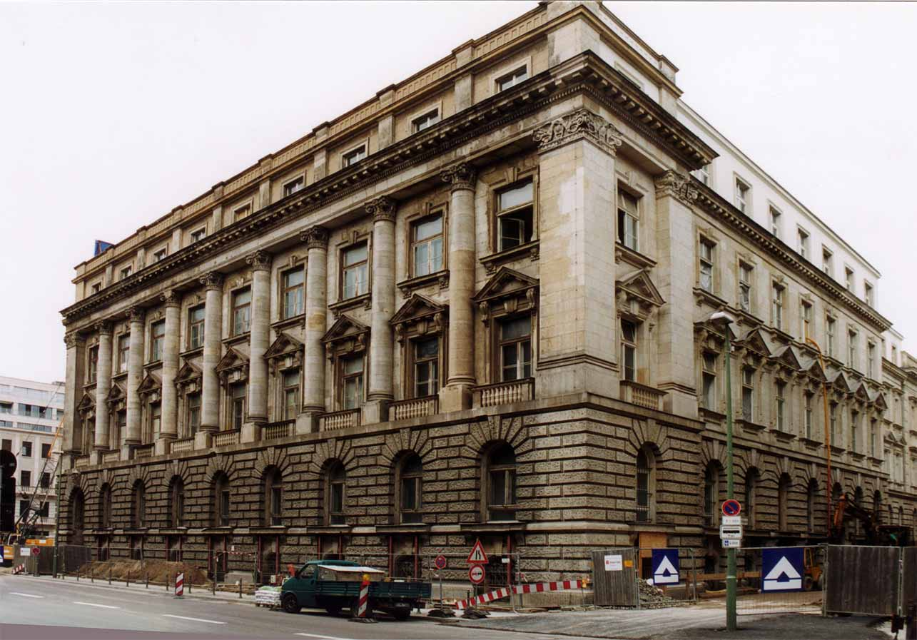 Berlin-Mitte, Französische Straße 35/ Behrenstraße 37 (Bebelplatz): 1945-1990 Sitz der Staatsbank der DDR, 2004-2006 Umbau zum Luxushotel "Hotel de Rome", Eröffnung am 12.10.2006